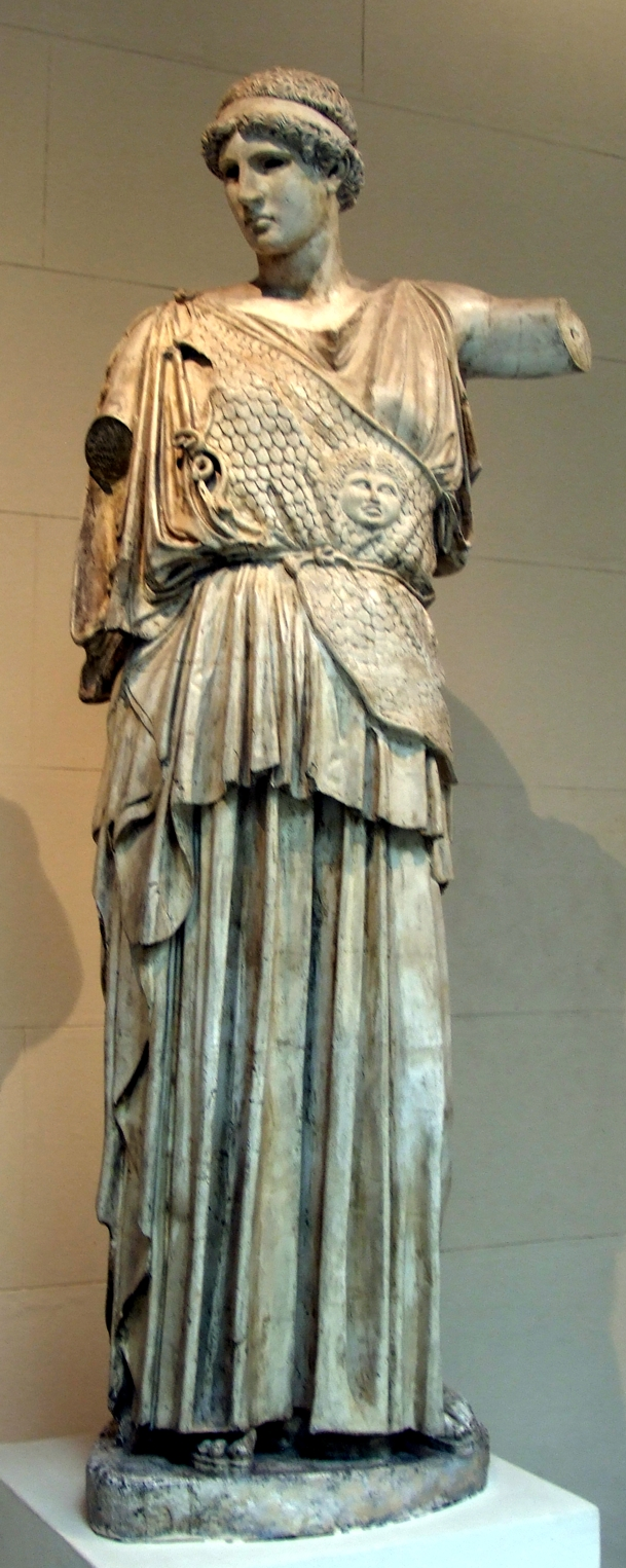 Phidias. Athena Lemnia in in the Staatliche Museum, Albertinum, Dresden. Plaster cast in Pushkin Museum, Moscow